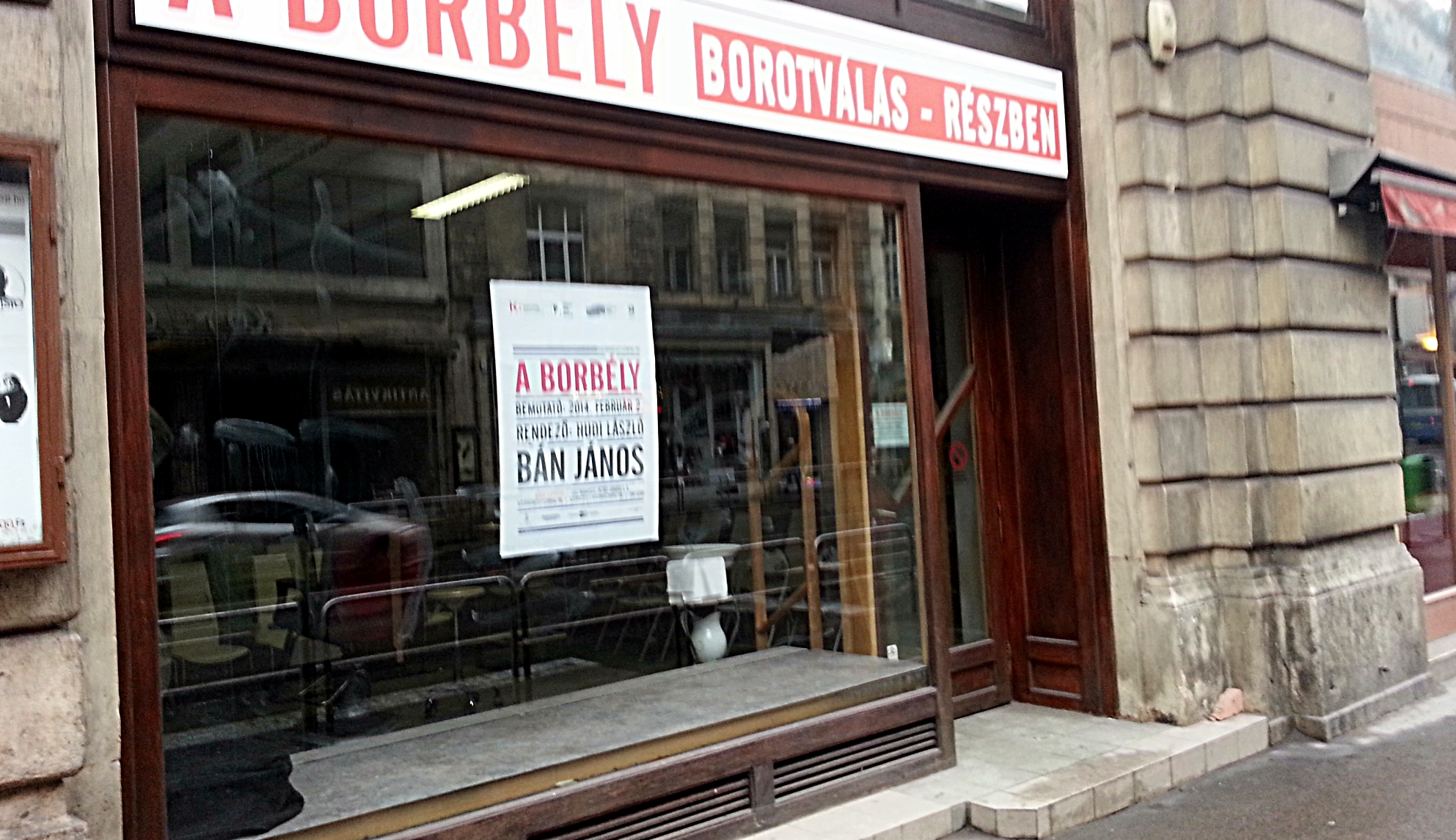 Katona József Színház „A borbély“ című darab játszóhelye, egy Kossuth Lajos utcai, üres üzlethelyiség. Budapest V. kerület.